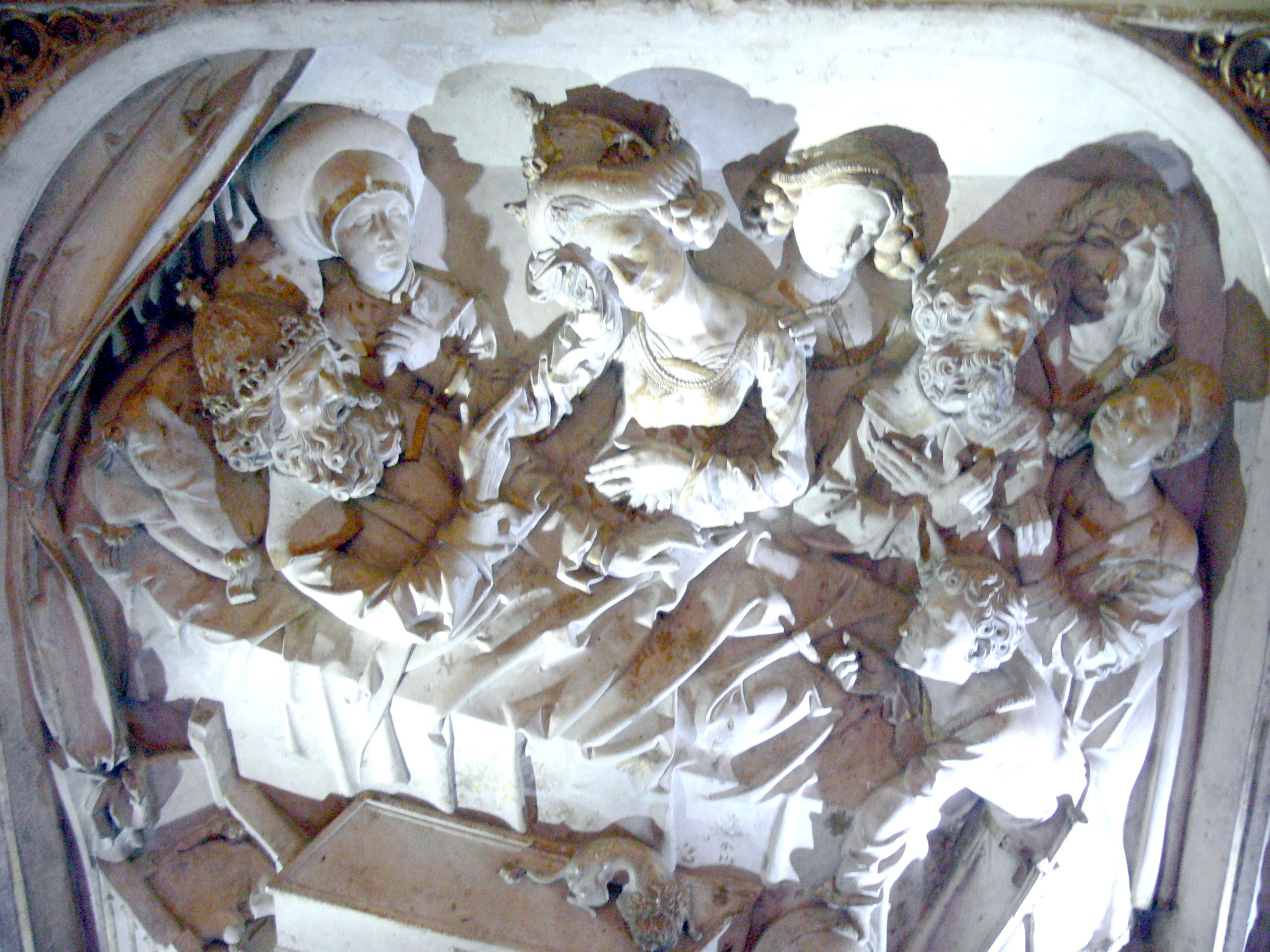 Grab Kaiser Heinrichs II. ( 1499 ) im Bamberger Dom: Kaiserin Kunigunde weint um den sterbenden Kaiser Heinrich II.